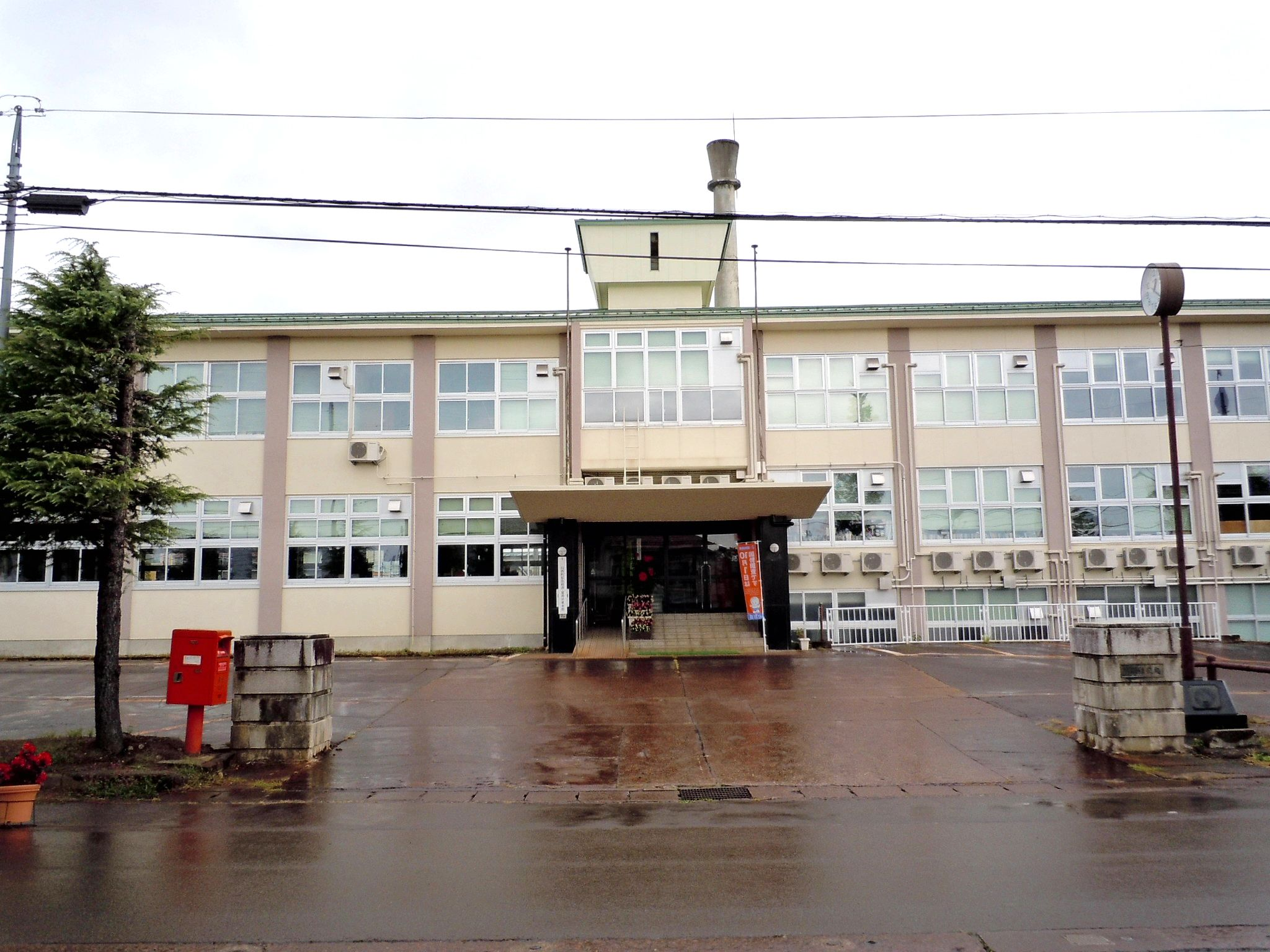 山形県東置賜郡川西町役場